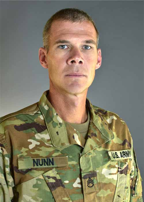 SSG Nunn